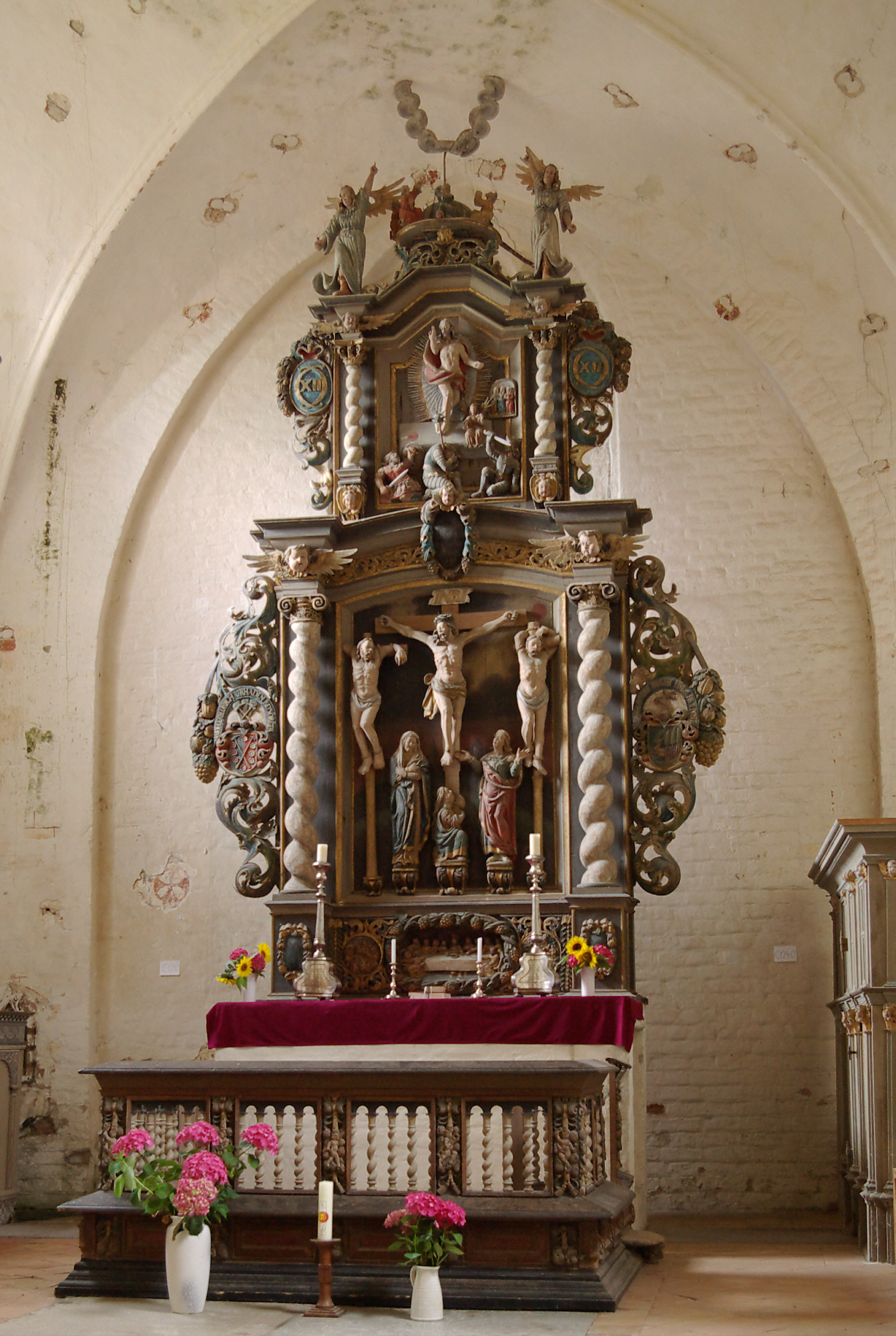 Altar der St. Marienkirche, rechts am Bildrand der Beichtstuhl. Im Hintergrund mit Zetteln markierte Wandmalereien, die im Zuge der Sanierungsarbeiten entdeckt wurden.